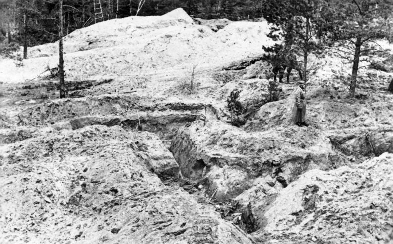 This description has been identified as biased or incorrect: Verleugnung der Wahrheit - DDR-PropagandaZentralbild II. Weltkrieg 1939 - 45 Im April 1943 starten die deutschen Faschisten die antisowjetische Propaganda über den Massenmord im Katyner Wald, 15 klm nw. von Smolensk, wo sie Massengräber mit ca. 11 000 ermordeten kriegsgefangenen Polen als Greueltaten der Sowjets erklärten. ( Die Außerordentliche Staatliche Kommission unter Leitung des Akademikers Burdenko stellte in ihrem Untersuchungsbericht vom 24.01.1944 fest, dass die Ermordungen nicht wie die Faschisten behauptet hatten, im Frühjahr 1940 sondern erst im Herbst 1941, also von den Faschisten selbst, stattgefunden haben.) U. B. z: eines der Massengräber im Wald von Katyn. April 1943